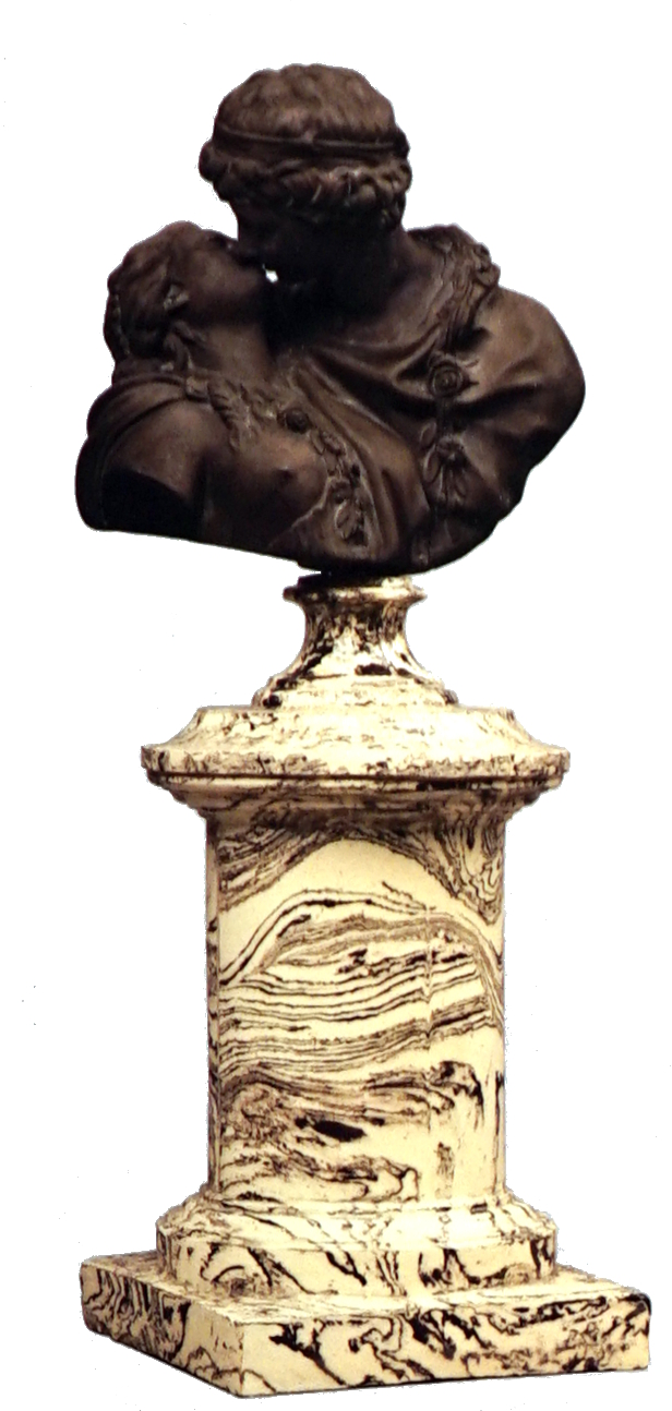 exposition temporaire au musée de Commercy.